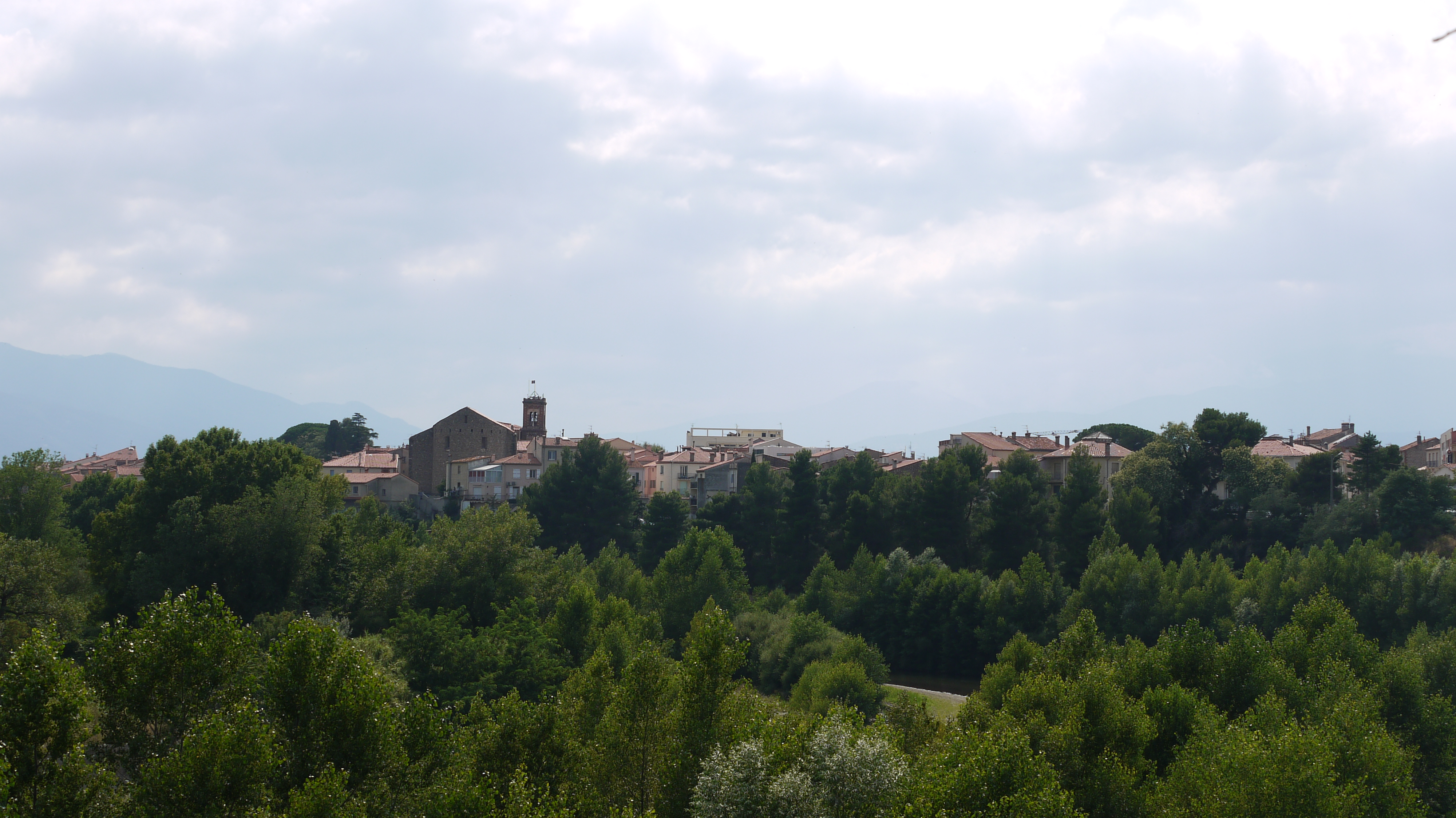 Vue du Boulou depuis le complexe sportif des Echards